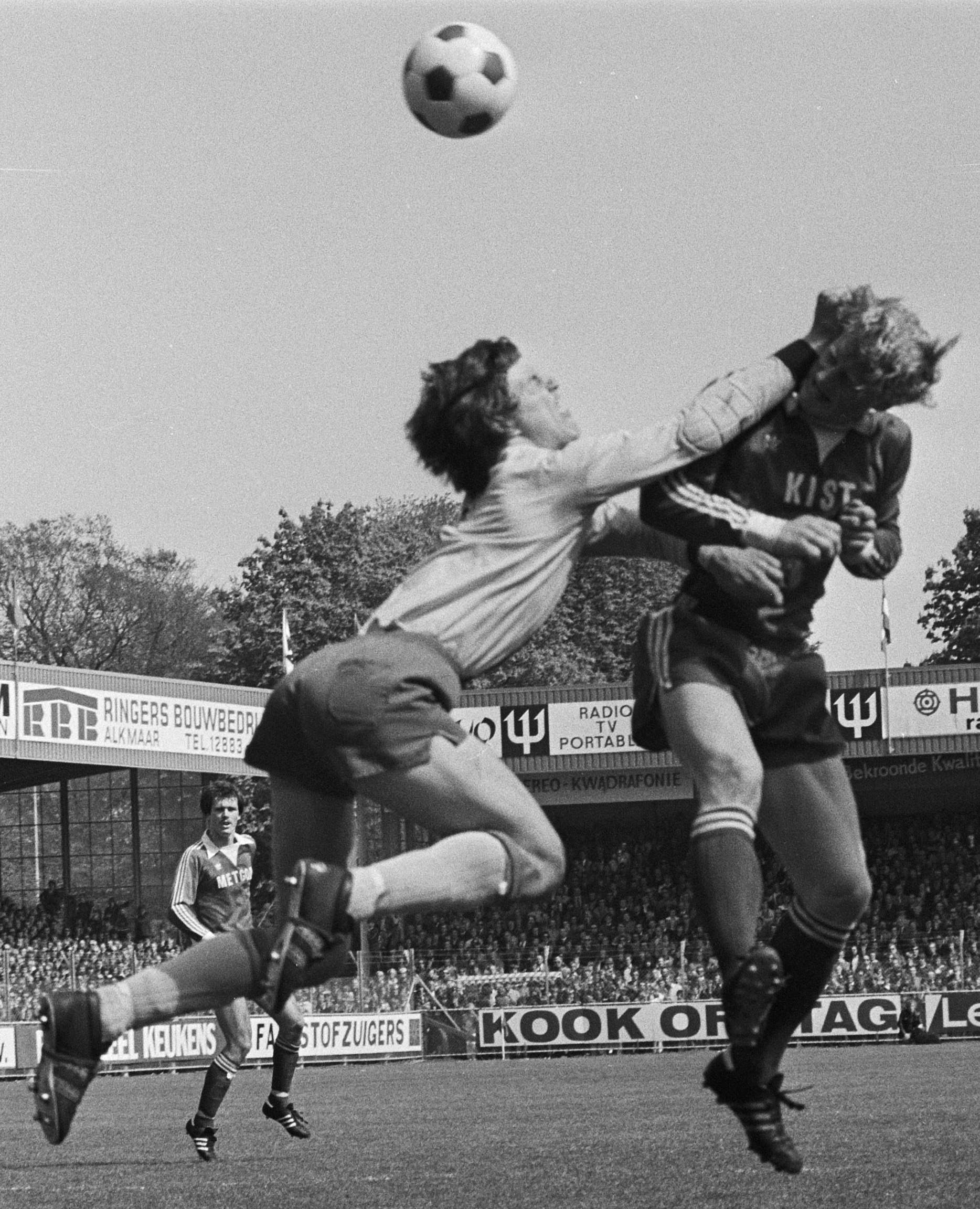 AZ67 tegen Den Haag 2-1, Kees Kist in duel met doelman Galje